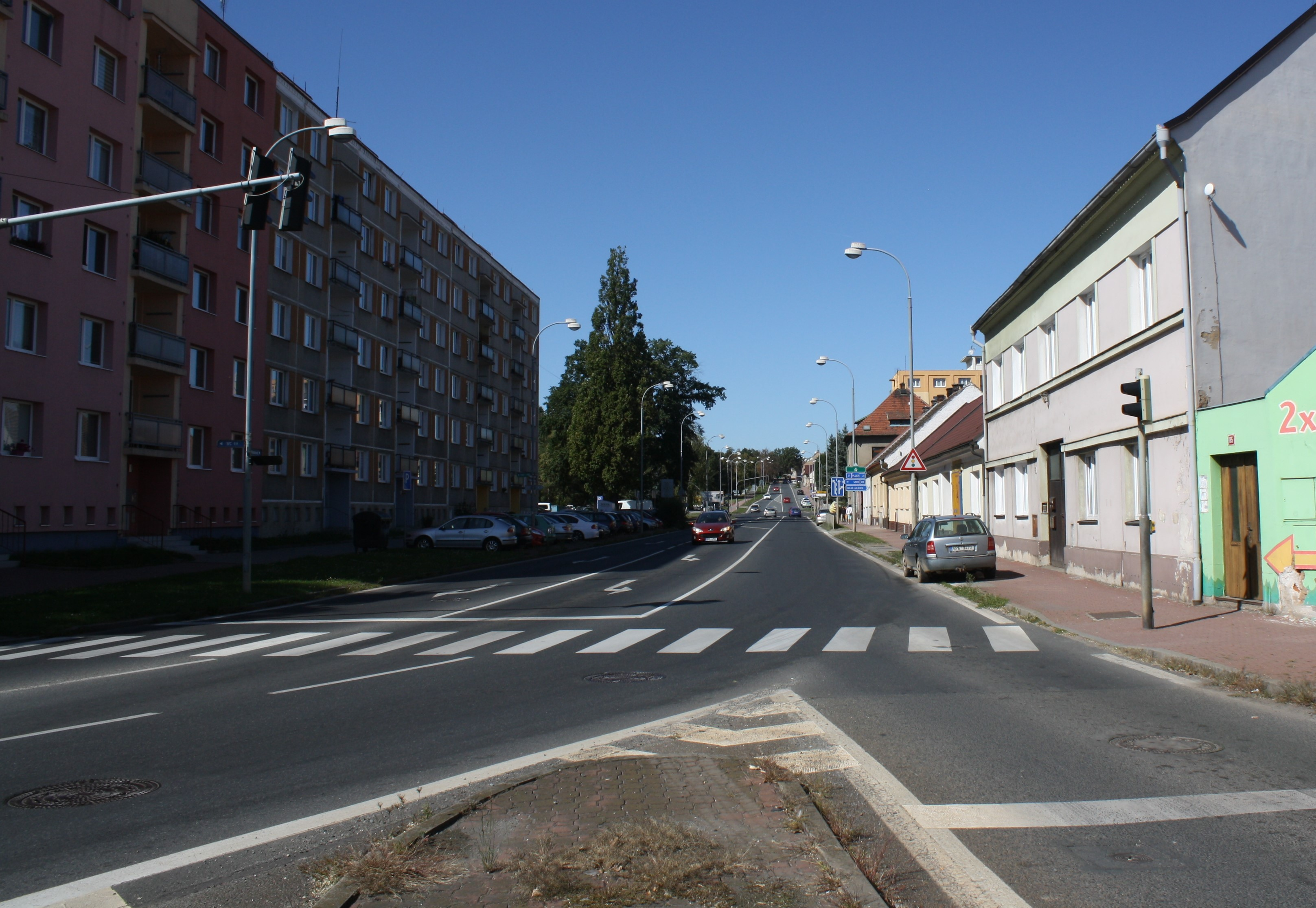 Začátek tř. 1. máje v centru Přeštic, na křižovatce s ulicemi Nepomucká a Rybova. Dochází zde také ke křížení silnic I/27, II/183 a II/230.